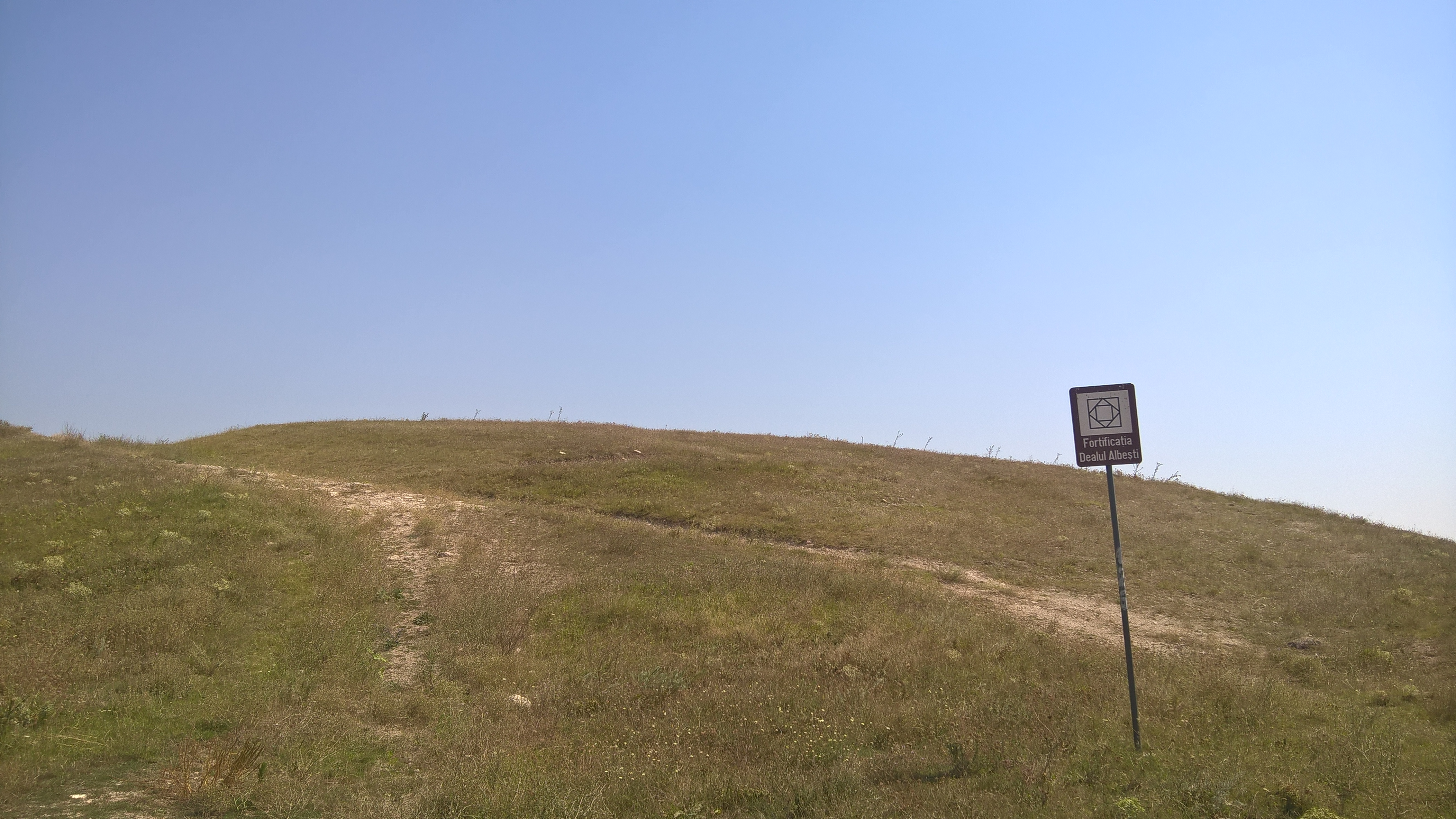 Fortificația de la „Dealul Albești”